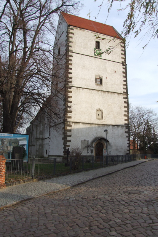 Kirche Sankt Bartholomäus in Belgern (Sachsen) Fotograf: Harald Rossa Datum: Dezember 2006 Höher aufgelöste Version ist verfügbar